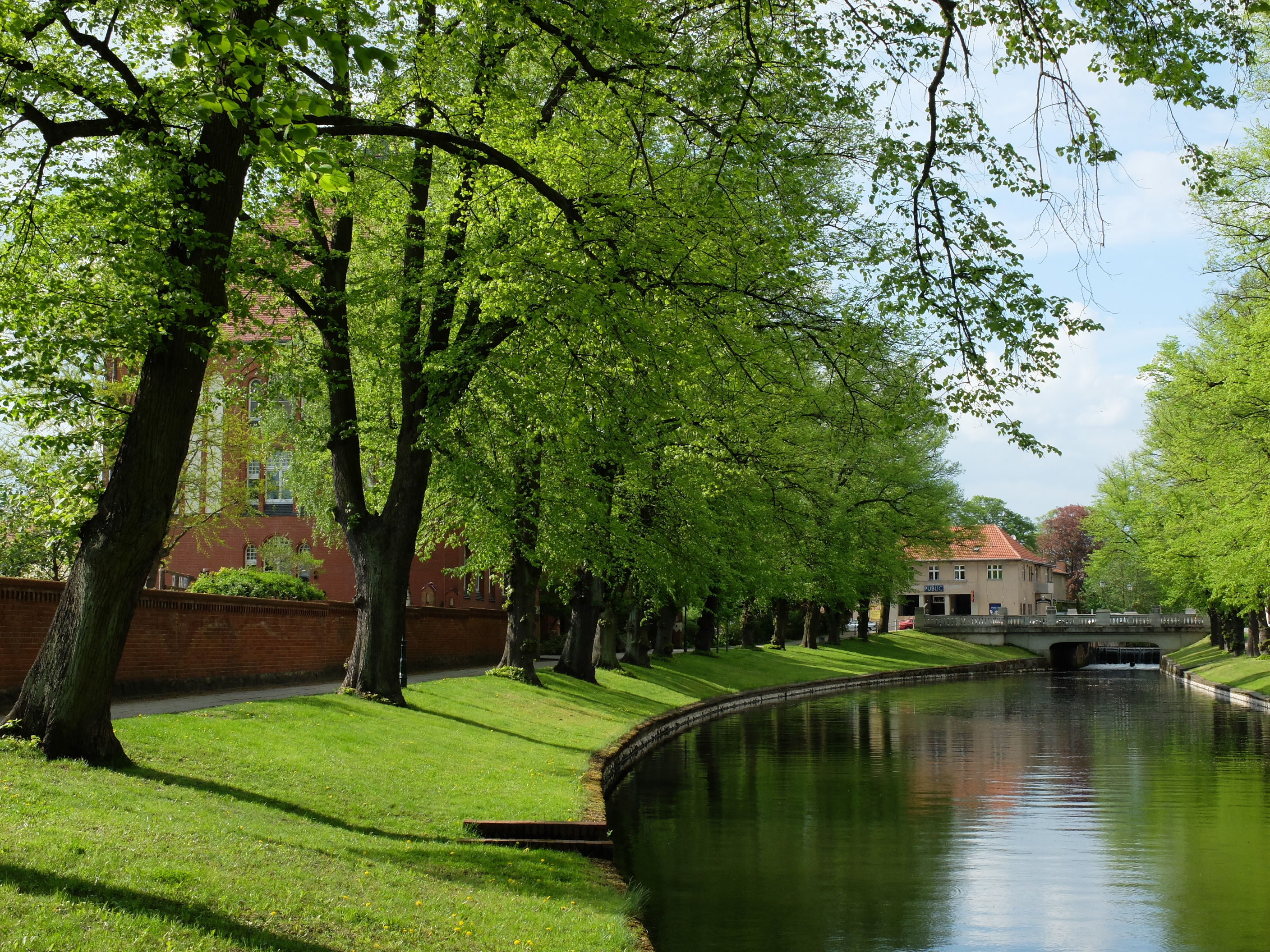 Der Weg „An der Buhne“ am Stepenitzufer in Perleberg.